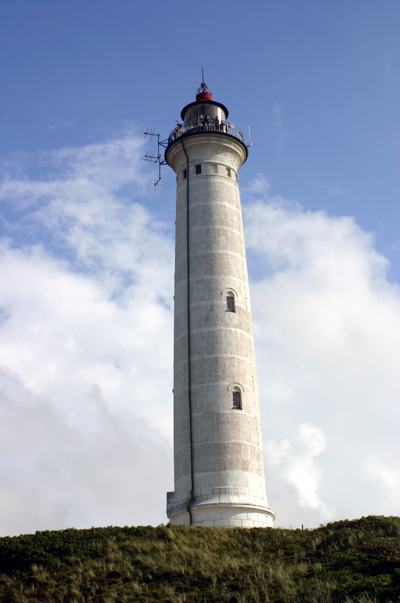 Lyngvig, Denmark, Lyngvig Fyr, Lighthouse